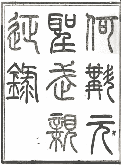 《元圣武亲征录》 桐庐袁氏。光緖16 [1890]。 哈佛燕京图书馆。